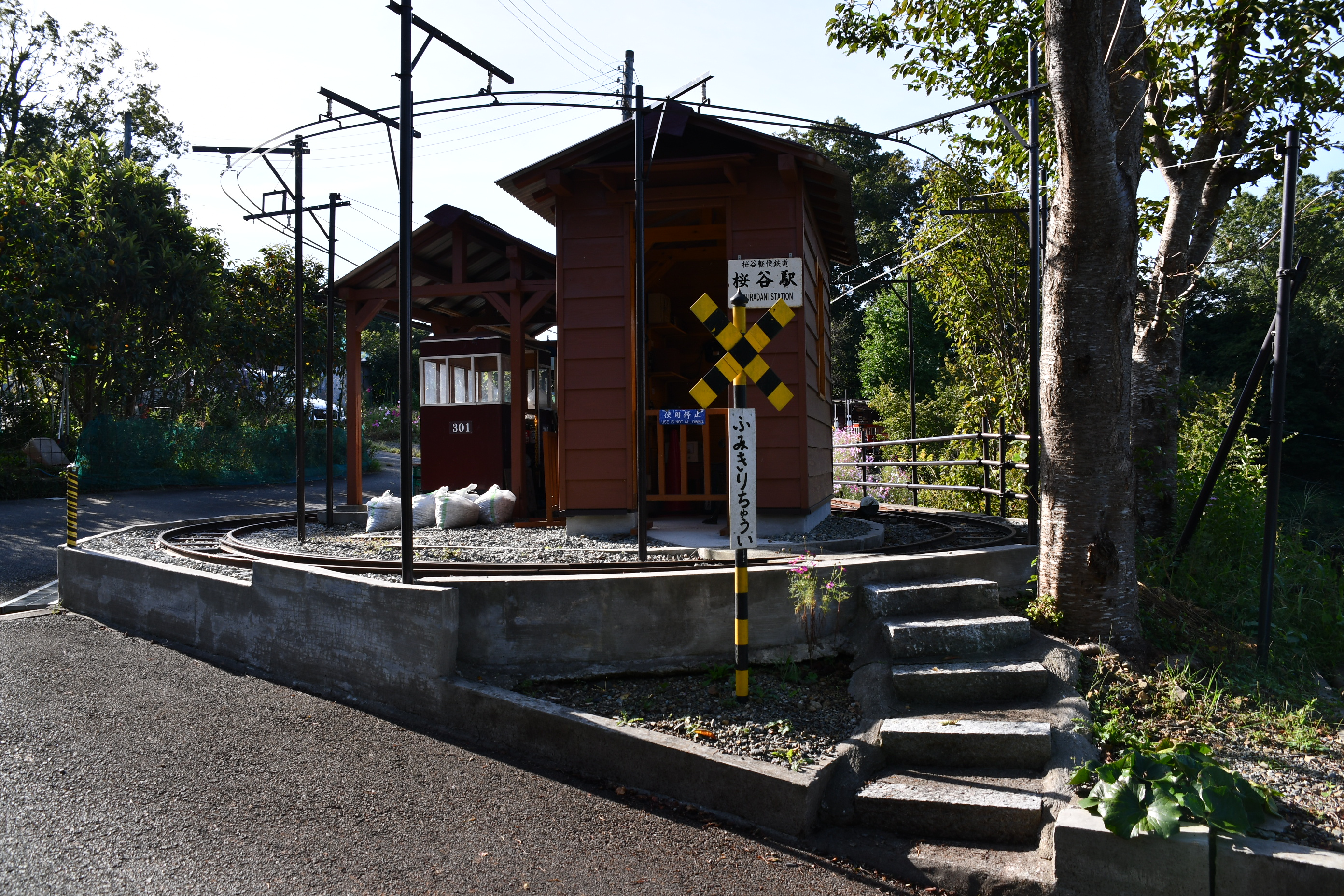 2017/10/1桜谷軽便鉄道南山線風の峠駅を撮影。